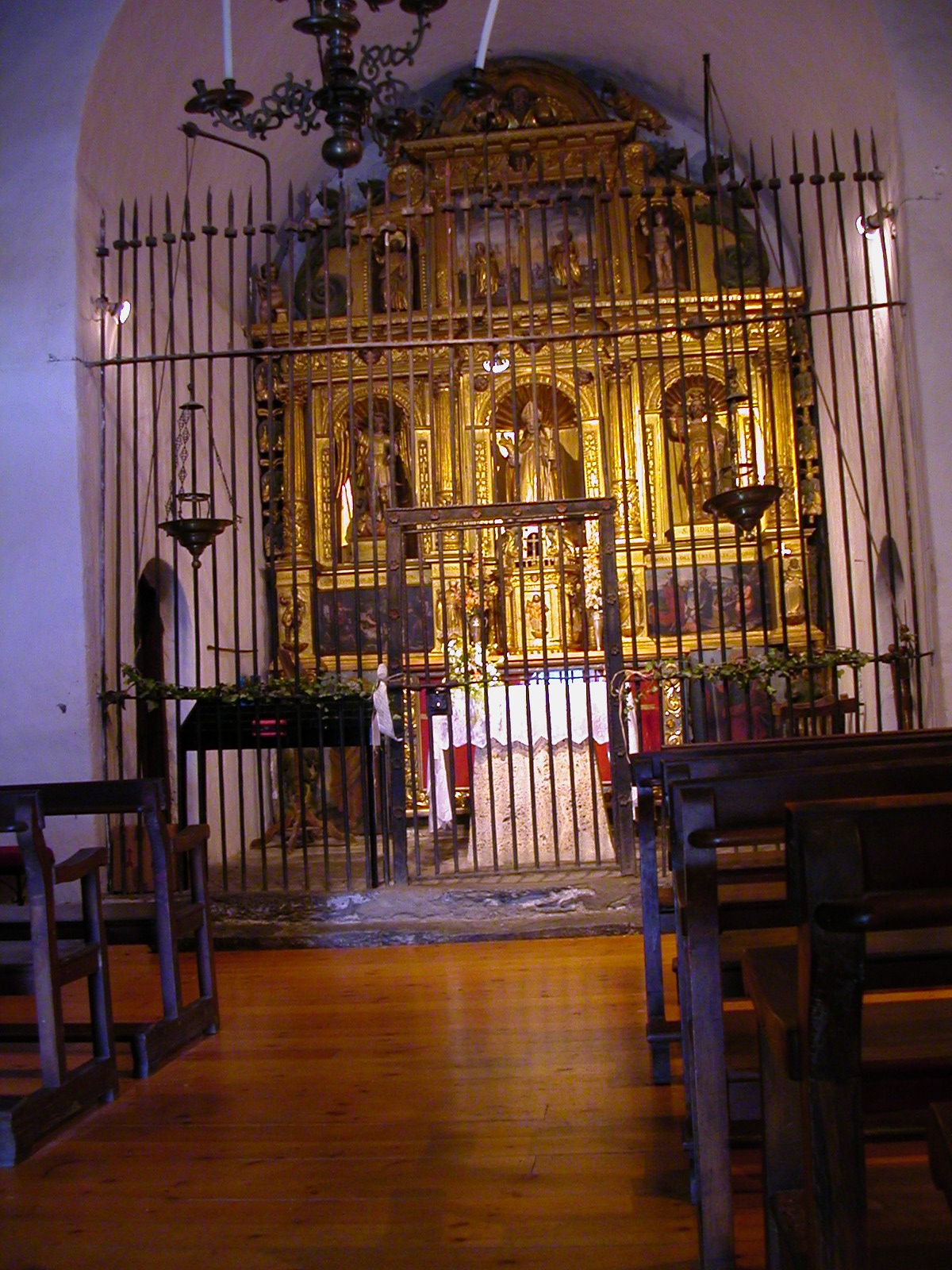 Sant Marti de la Cortinada, Ordino, Andorra